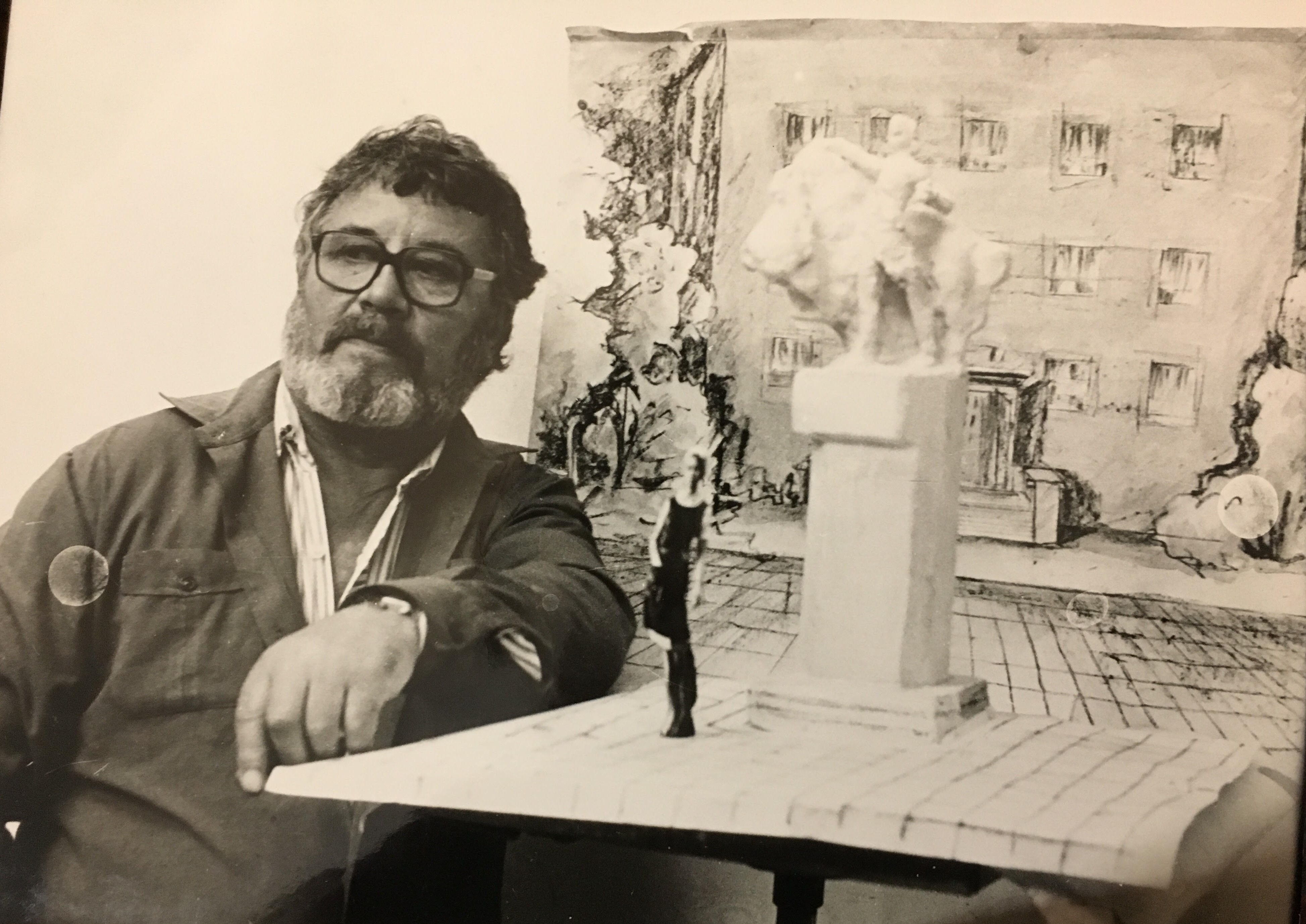 Vlad Ushakov